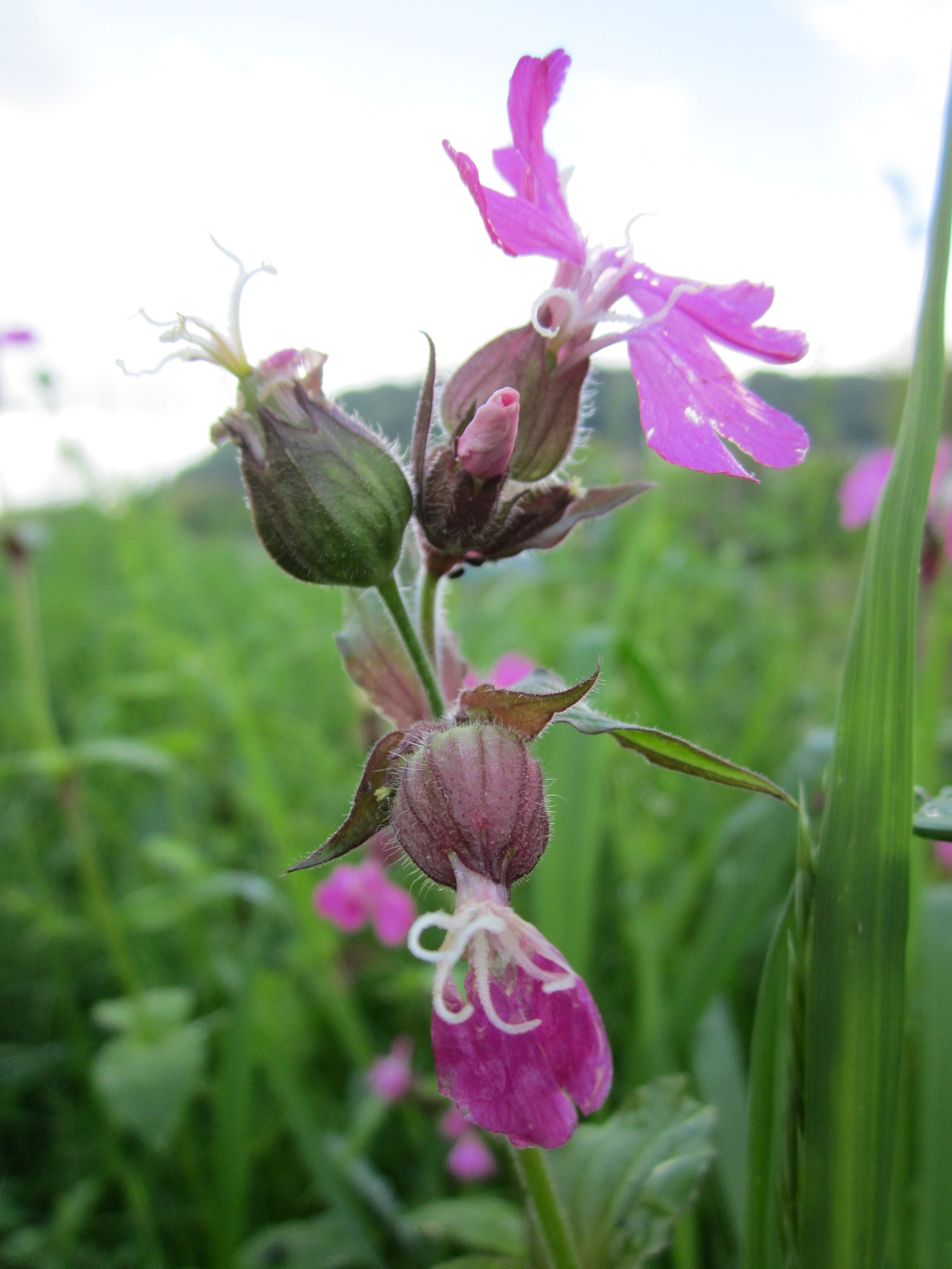 Rote Lichtnelke (Silene dioica) an der Saar in Saarbrücken